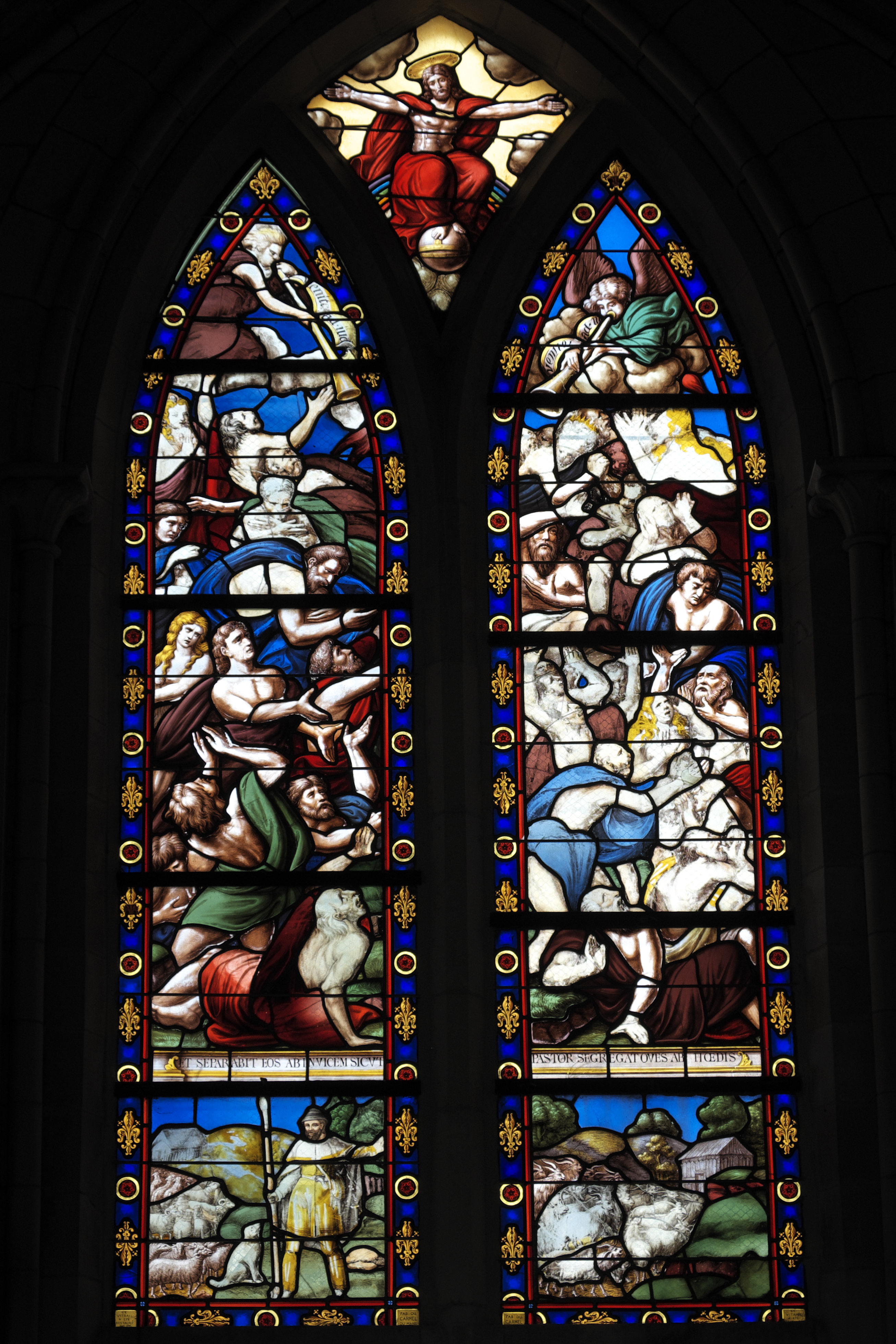 Ehemalige Kathedrale Saint-Paul-Aurélien in Saint-Pol-de-Léon im Département Finistère (Region Bretagne/Frankreich), Bleiglasfenster